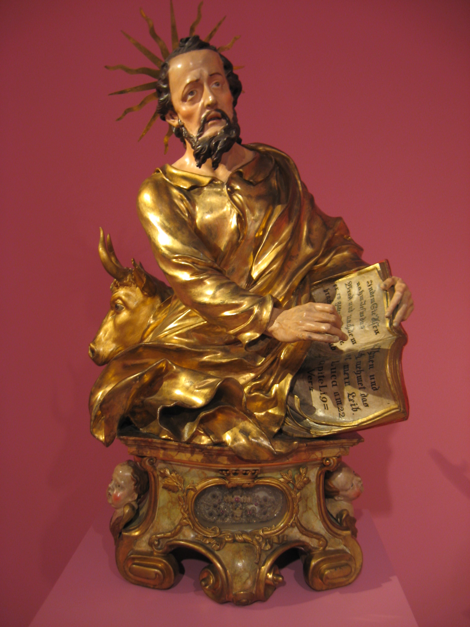 Photo einer Zunftbüste: Evangelist Lukas, vermutlich nach Entwurf von Wentzinger († 1797), Augustinermuseum Freiburg